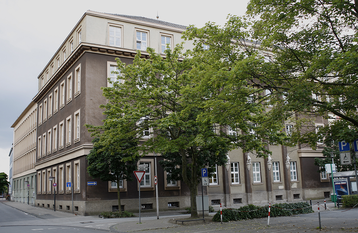 Das Foto zeigt das Stadthaus in Hamm.